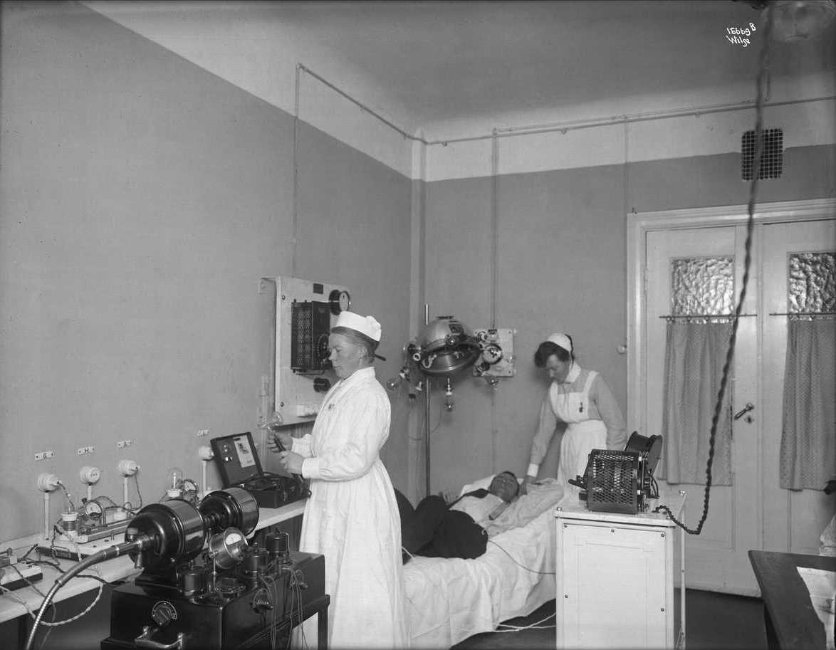 Midtstuen sanatorium, interiør, behandlingsrom, kvinner2, sykepleiersker, mann, pasient.